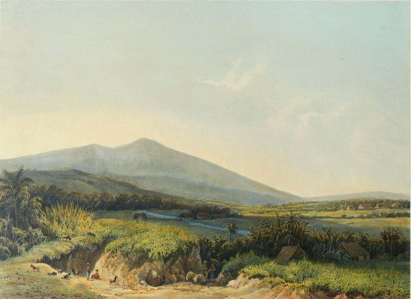 Litho. Litho naar een oorspronkelijk schilderij van A. Salm.. Uitzicht op Kedong Badak en de grote weg naar Buitenzorg